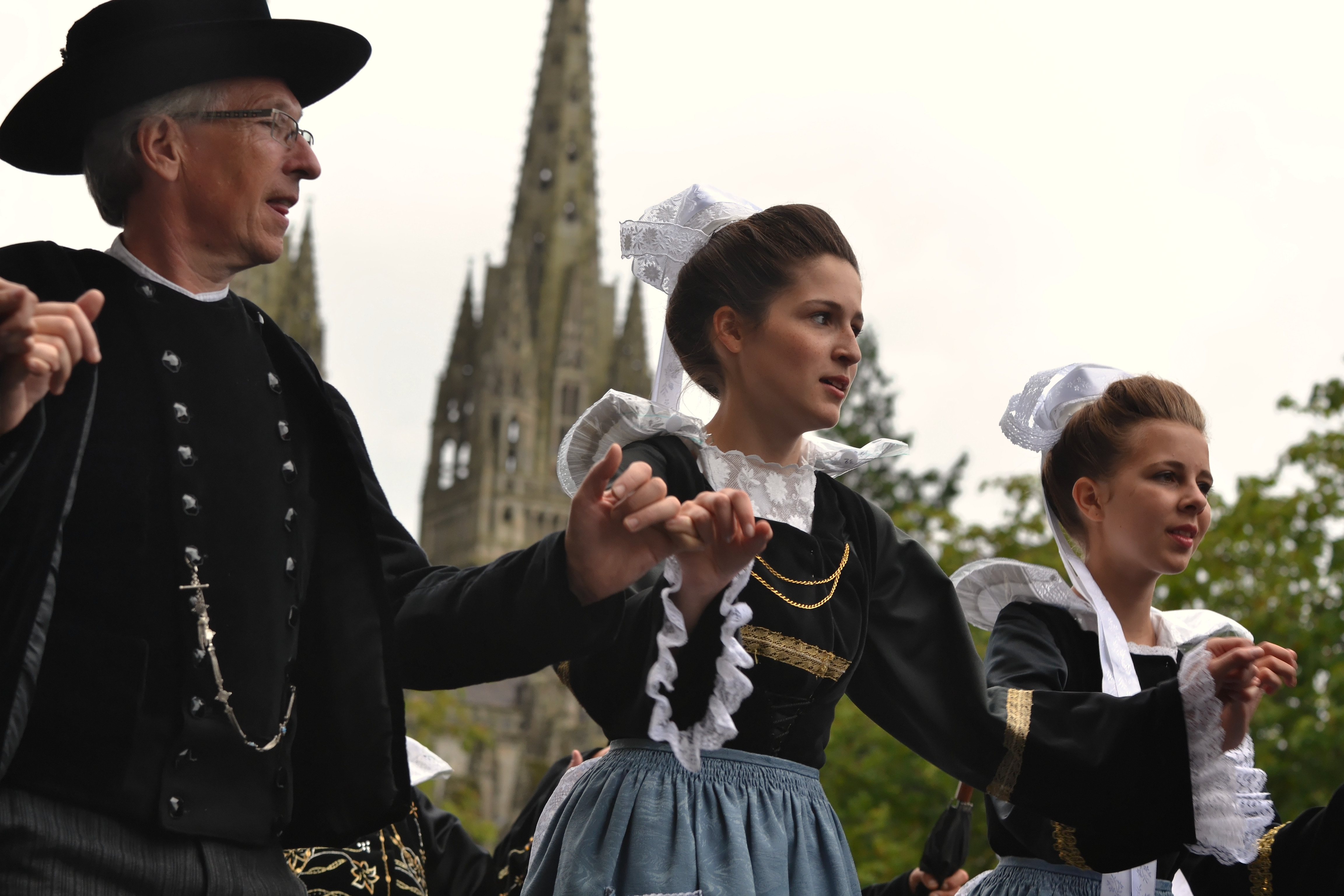 "Défilé en fête". Le cercle Ar Bleunioù Kignez (La Forêt Fouesnant) lors du festival de Cornouaille 2013 le dimanche 28 juillet pour Kemper en Fête dans les rues de Quimper.